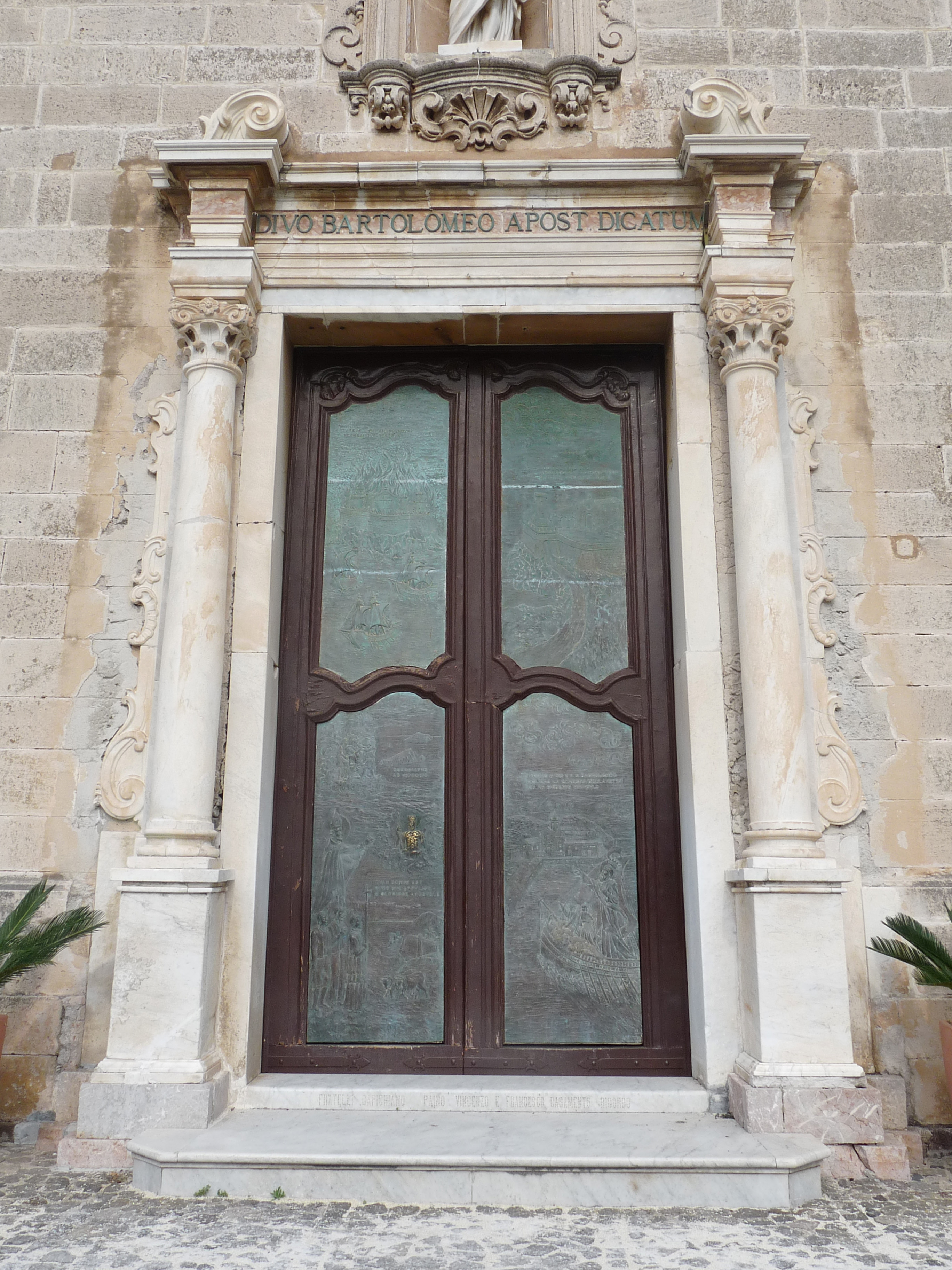 Porte de la cathédrale de Lipari (îles Eoliennes, Sicile)